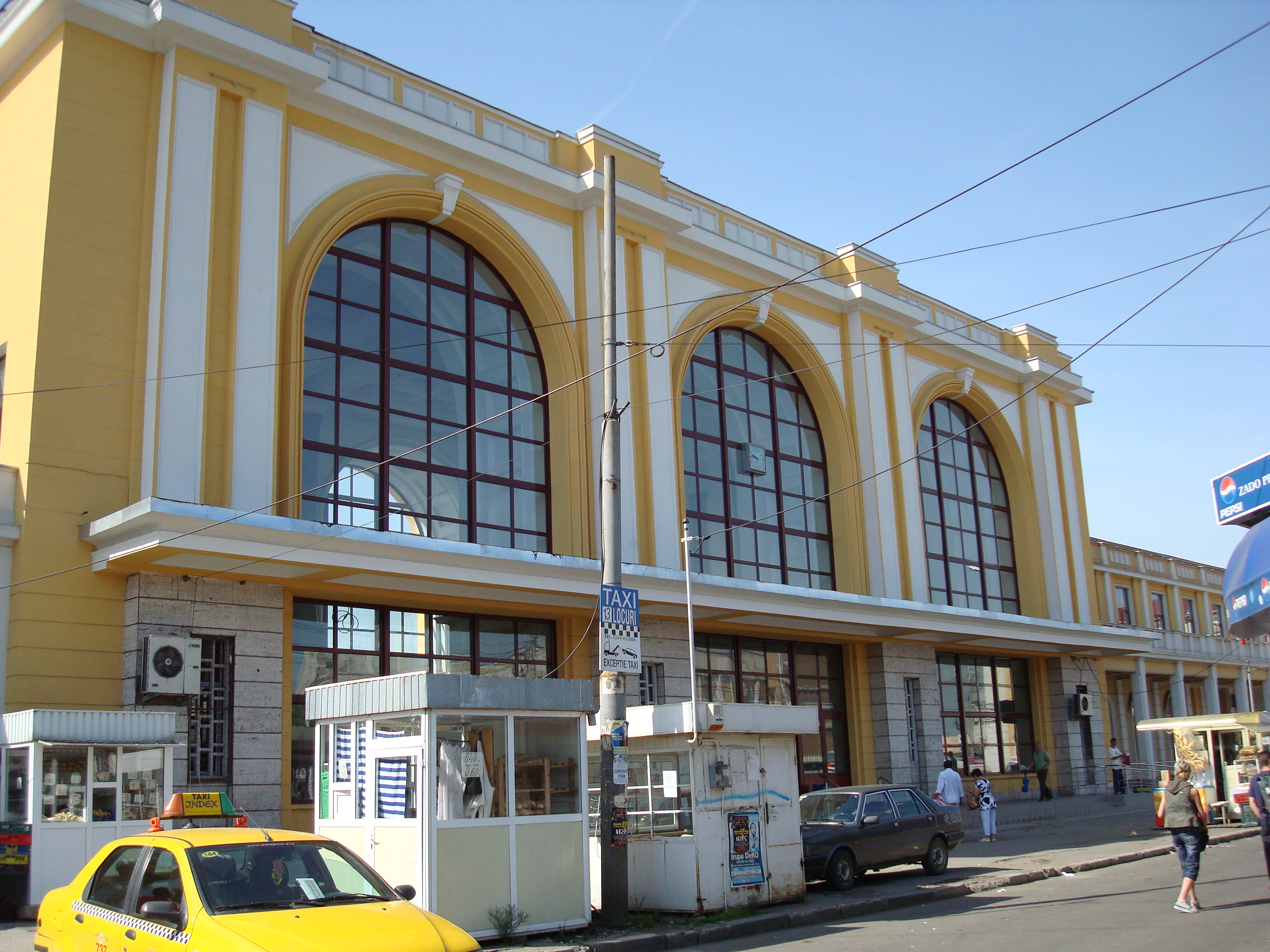 Gara Ploiesti Sud (31-05-2008)